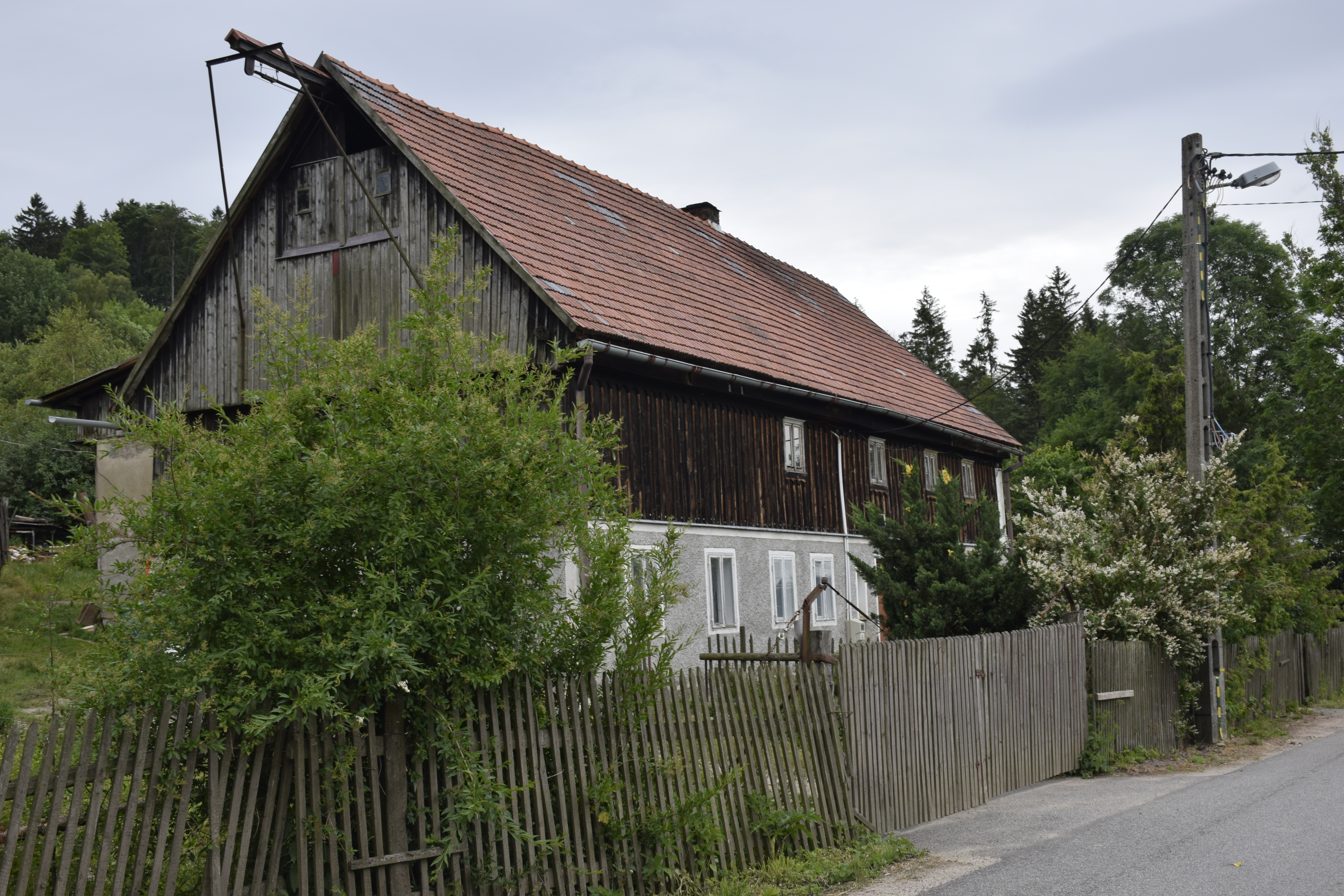 Pastevnik (województwo dolnośląskie). Polska